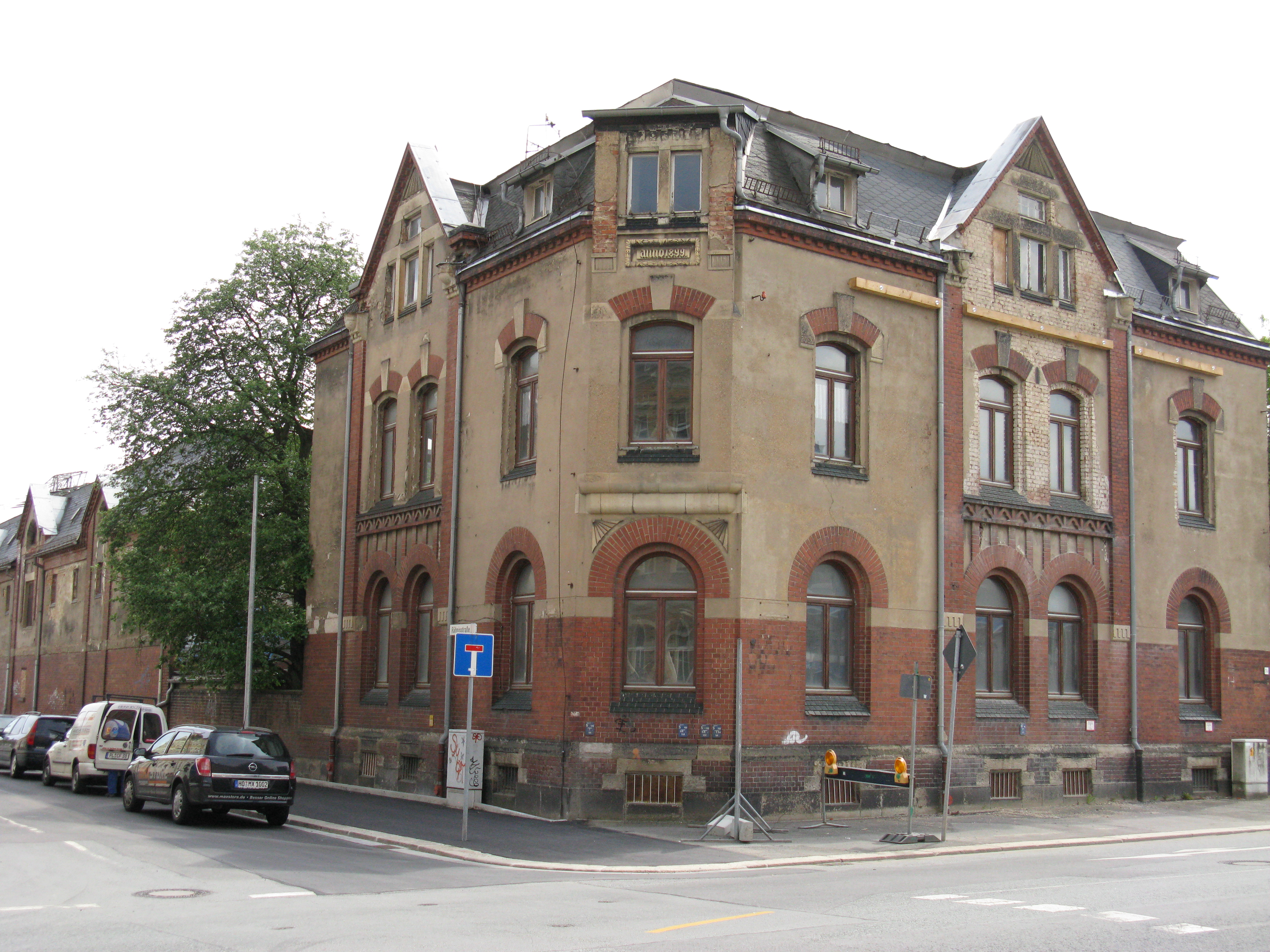 Plauen, denkmalgeschütztes Haus in der Hammerstraße (Hammerstraße 74).